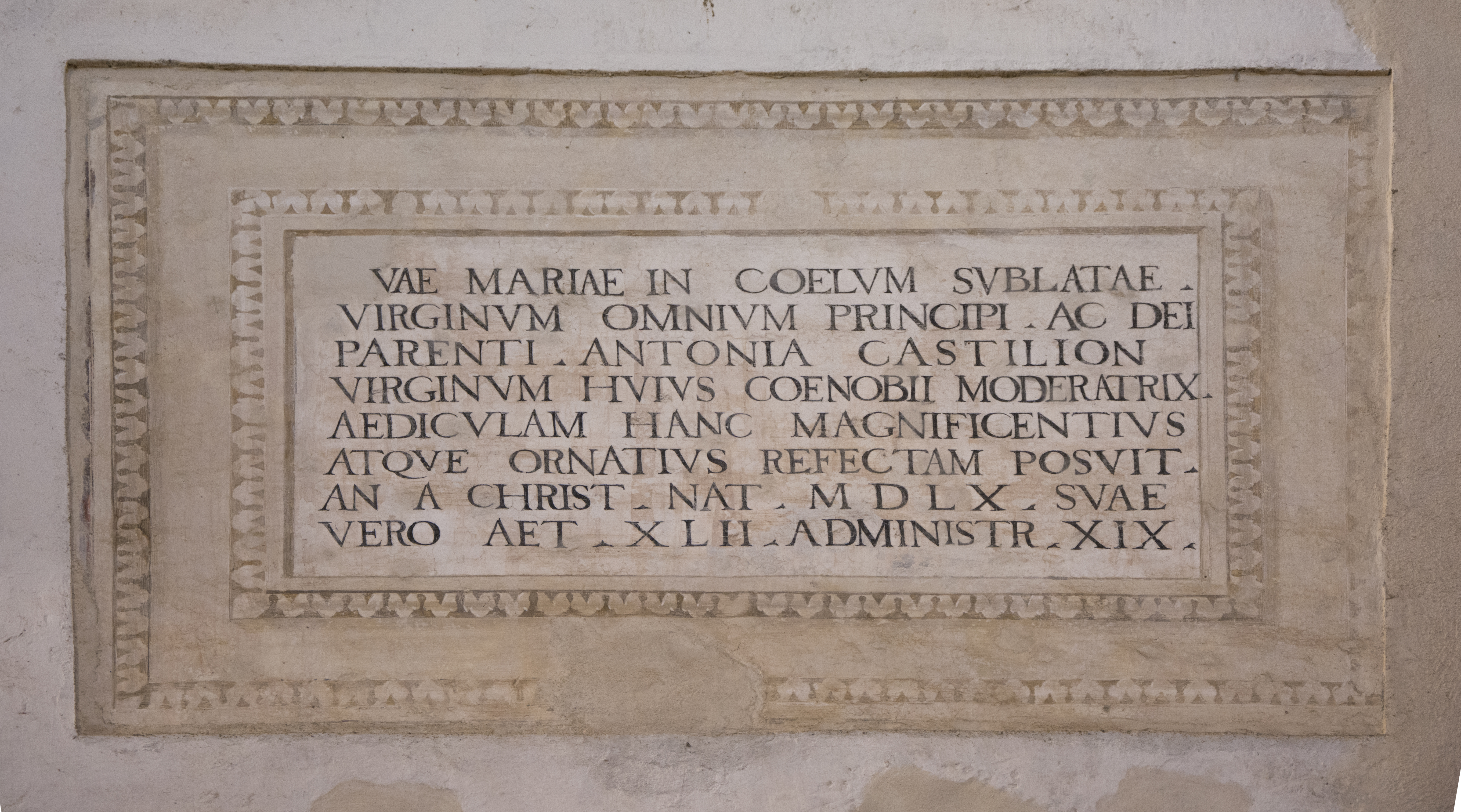 Epigrafe della badessa Antonia Castiglioni nel monastero di Cairate, in provincia di Varese.